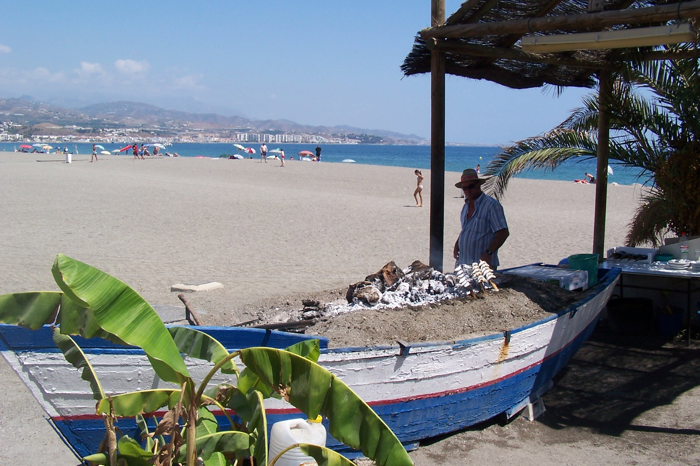 Henry Kelder